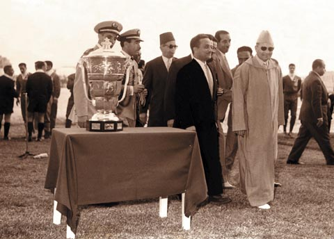 Mohamed V et Haj Benjelloun lors de la 1ere finale de la Coupe du Trône 1956/1957